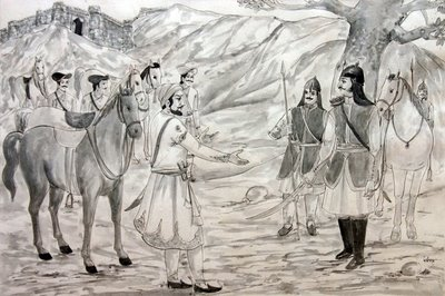 Shivaji advice to Chhatrasal